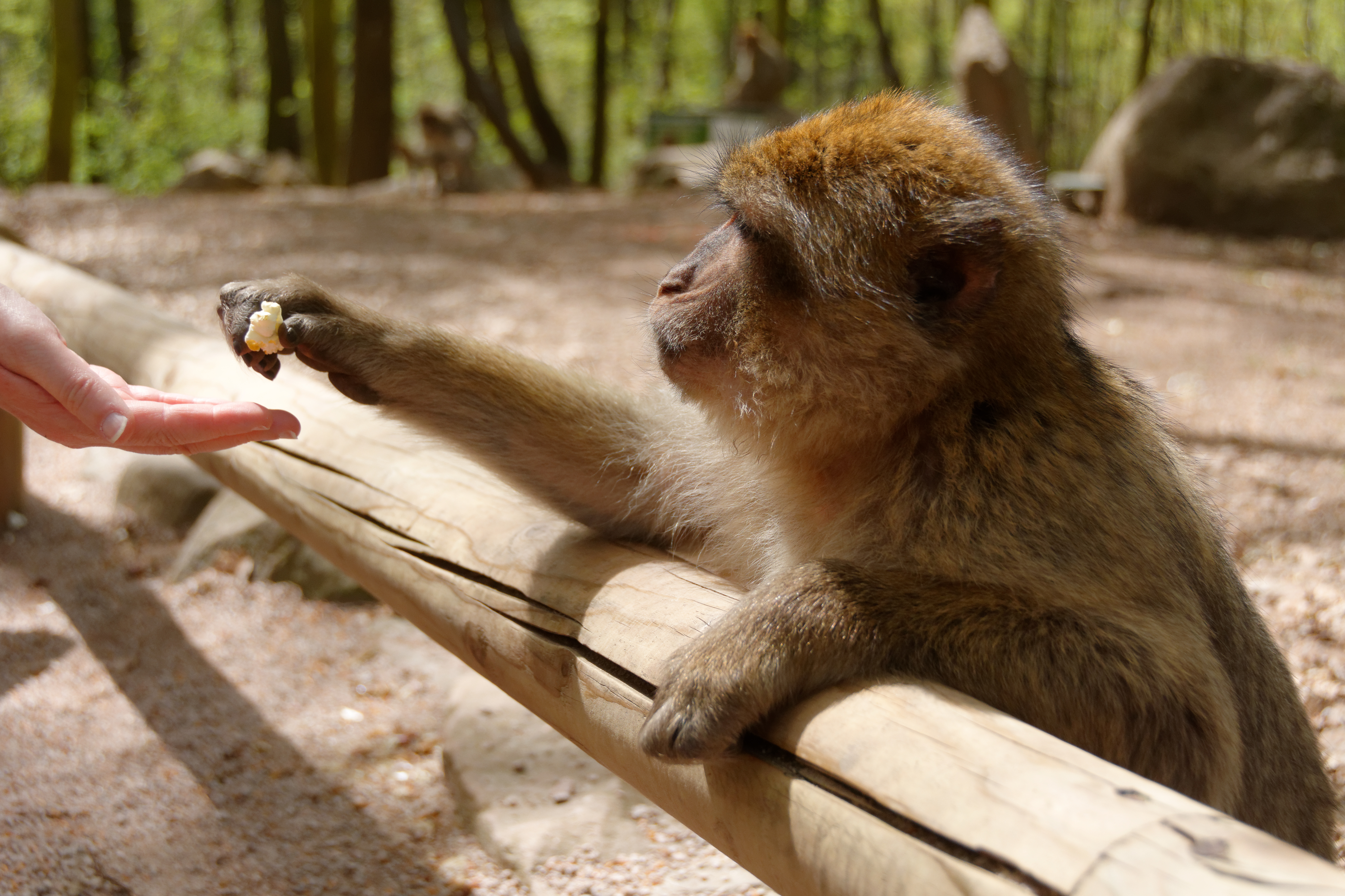 Montagne des singes : Macaque de Barbarie (Macaca sylvanus).